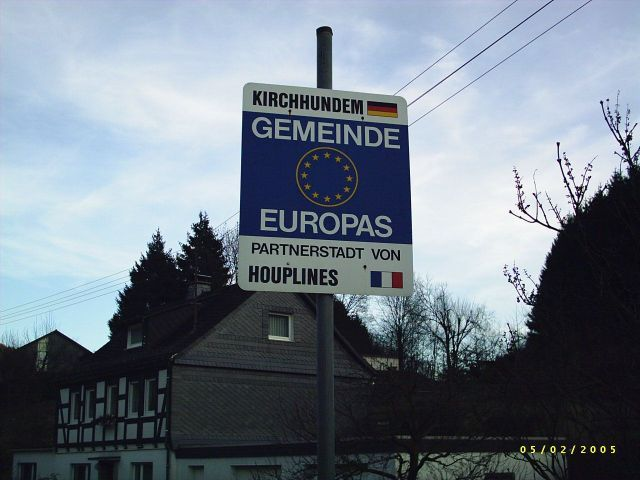 Hinweisschild auf die Städtepartnerschaft am Ortseingang